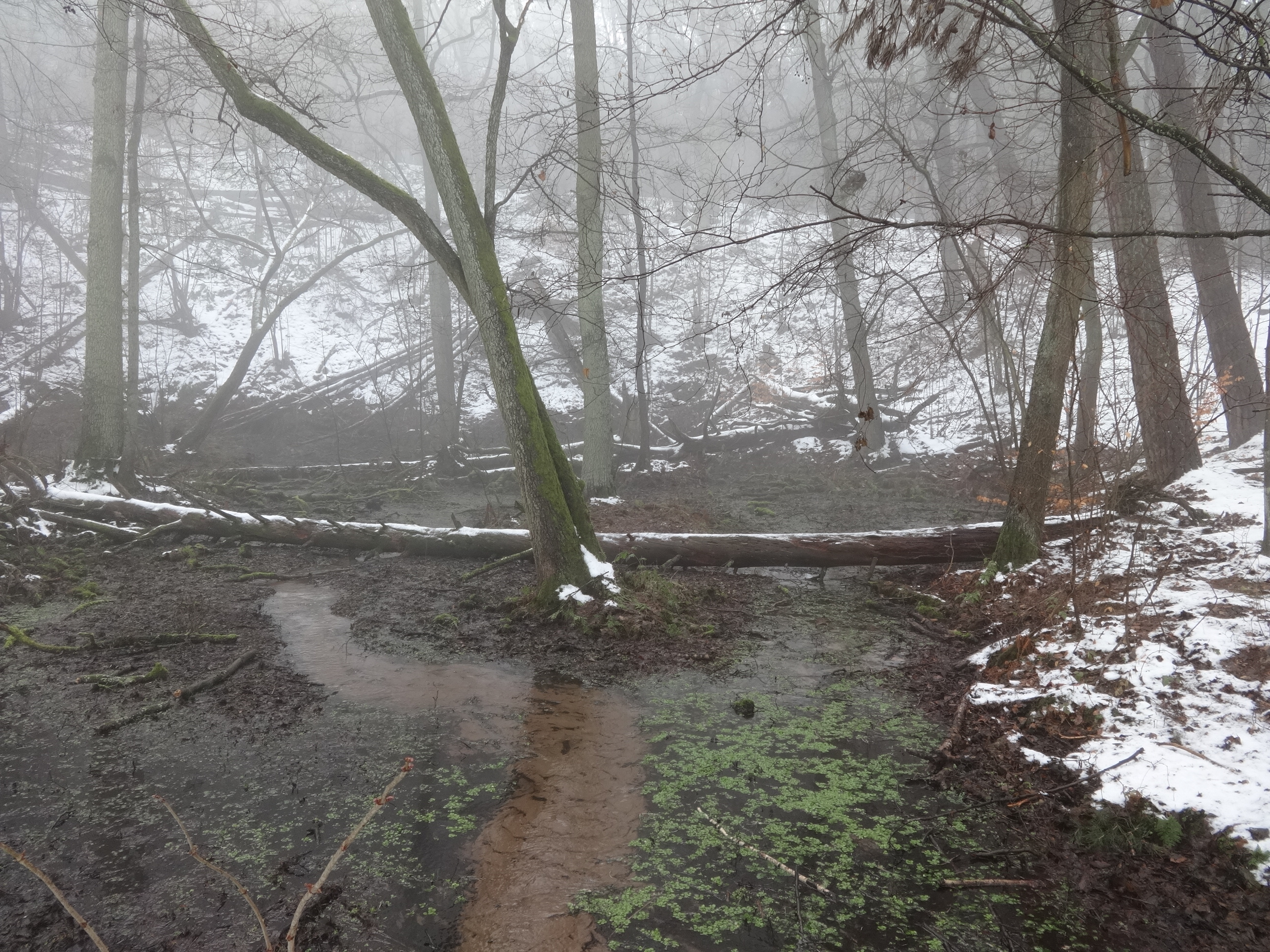 NSG Briesensee und Klingeberg in Teupitz, Brandenburg